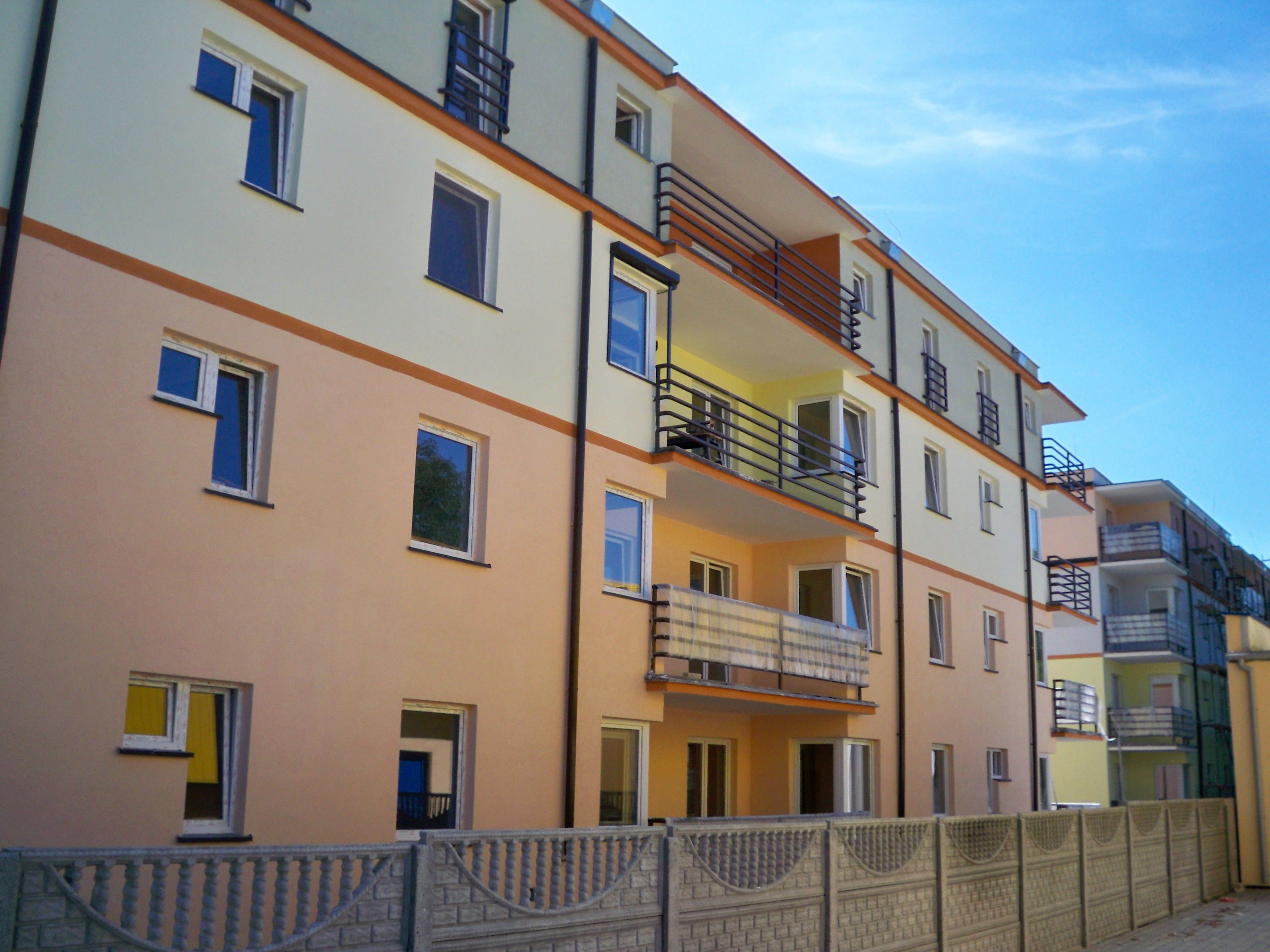 Nowy blok przy ul. Stodólnej 11E (2009 r.).